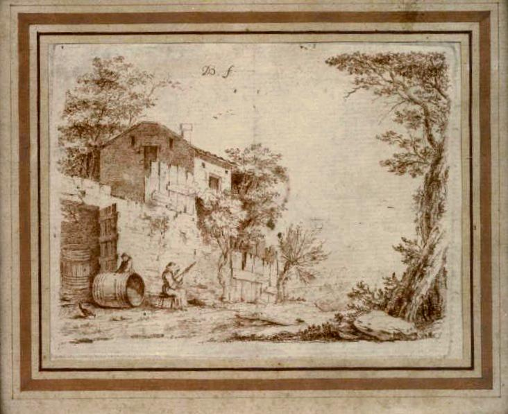 gravure